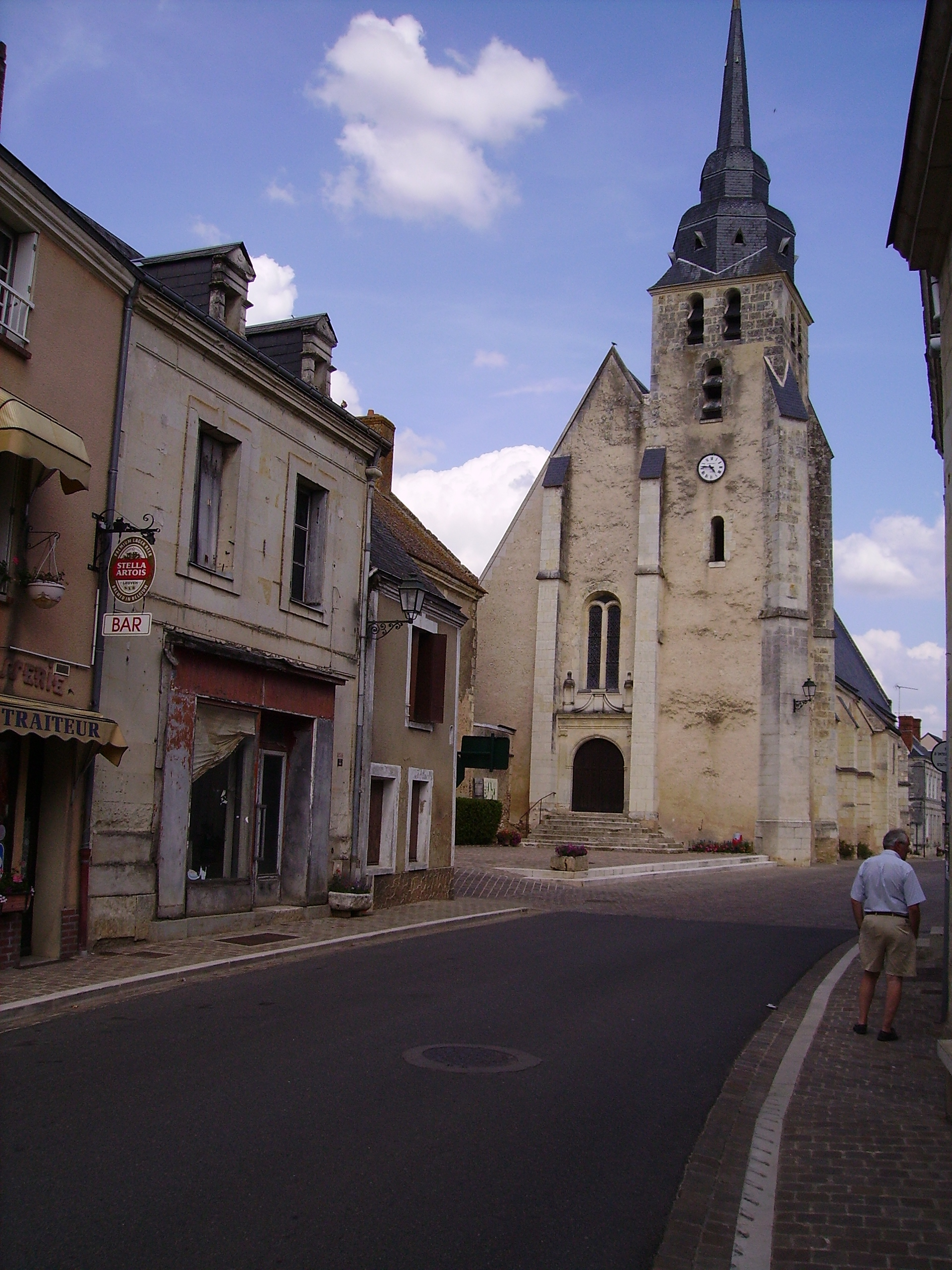 Place principal de Sougé avec l' église